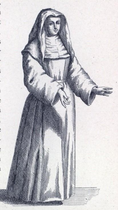 Peemier Vêtement religieux des Augustines de Paris